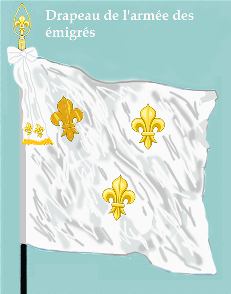 Drapeau de l'armée des émigrés 1793 à 1816